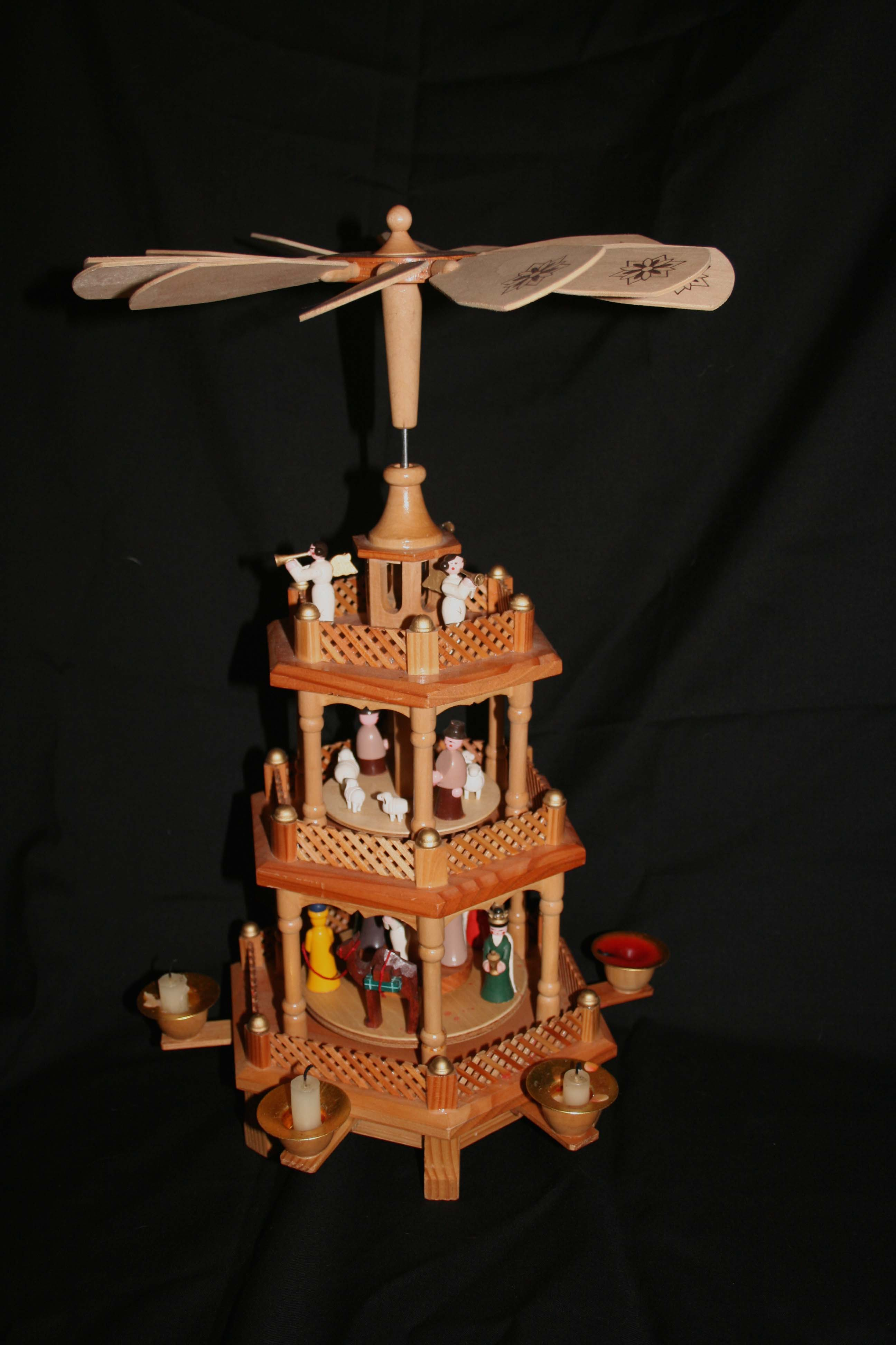 Weihnachtspyramide (Christmas pyramid) from Germany in Erzgebirge Kunst